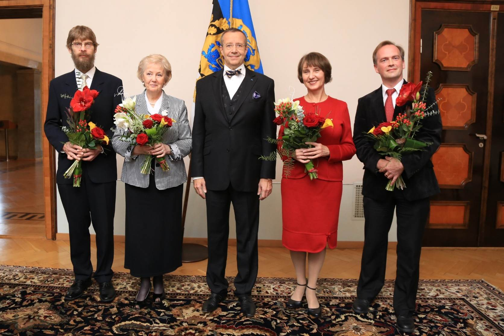 Vabariigi Presidendi hariduspreemia üleandmine 30. oktoobril 2013.